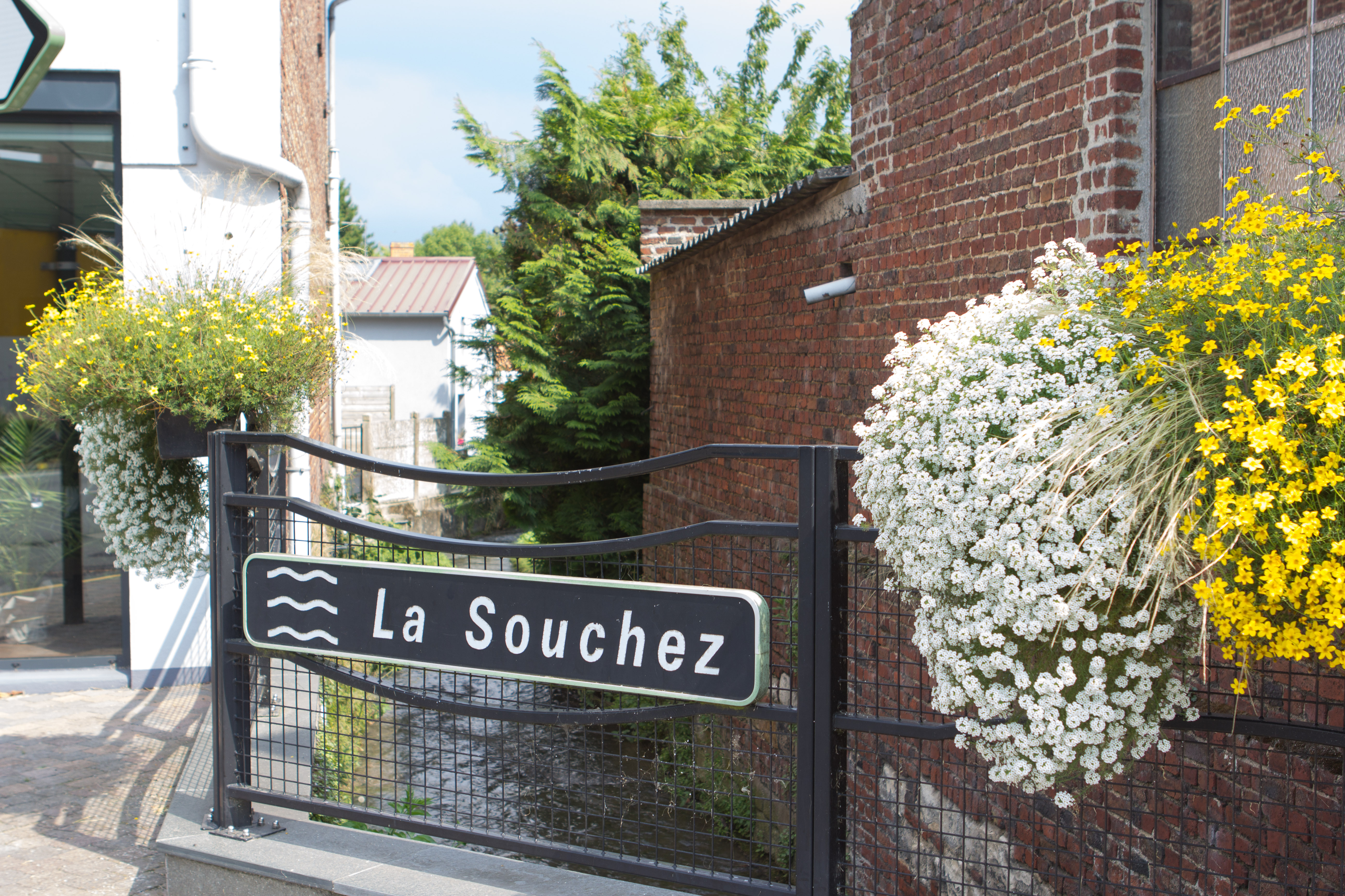 La rivère Souchez / Souchez / Pas-de-Calais / France